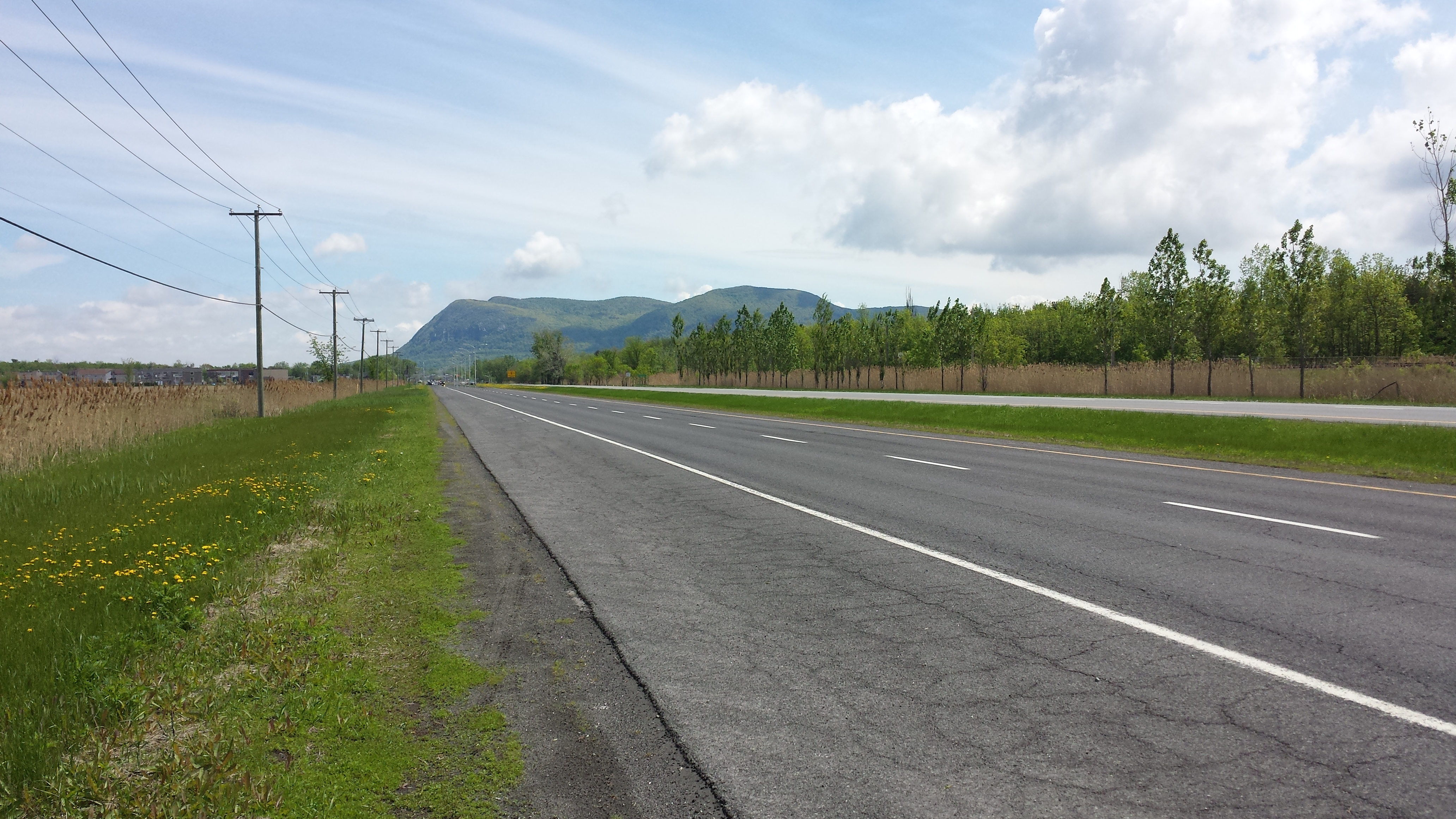 Vue de la face ouest du Mont Saint-Hilaire (Québec - Canada), prise de la route 116 à Saint-Basile-le-Grand